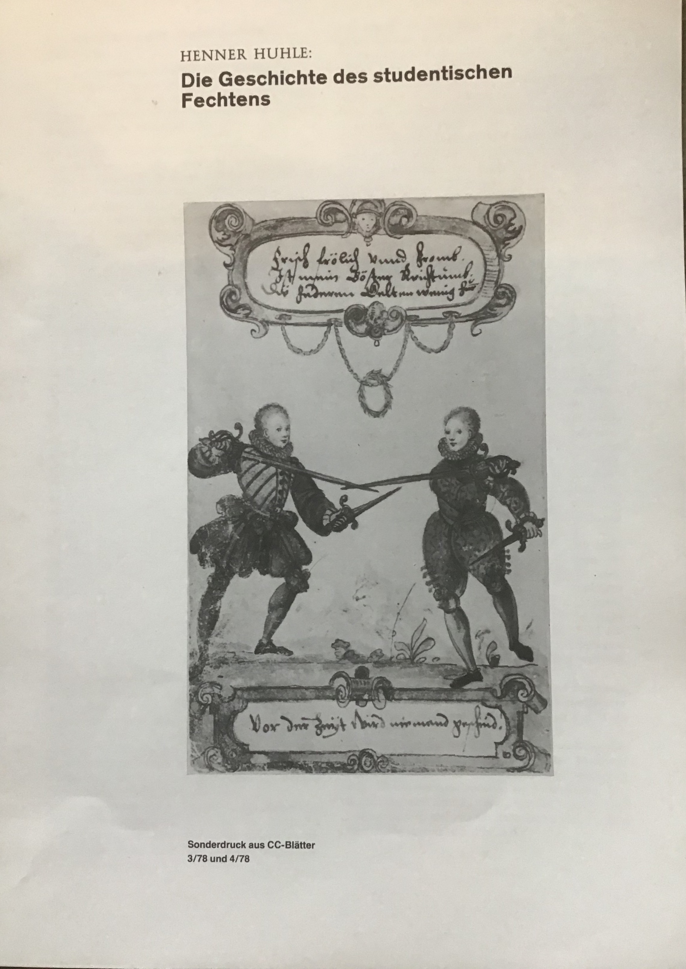 Dieses Werk geht auf die enge Verflechtung zwischen dem akademischen Fechten und dem Studententum ein.